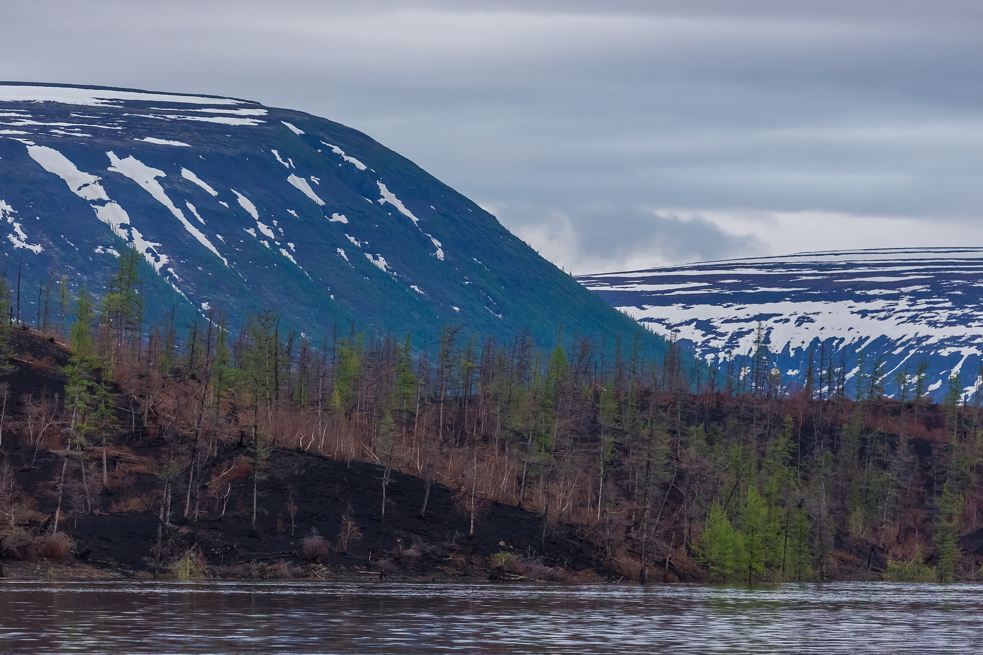 Путоранский заповедник: Заповедник в пределах плато Путорана, в северо-западной части Среднесибирского плоскогорья, южнее полуострова Таймыр, Красноярский край This image is related to the protected area of Russia number 2400003